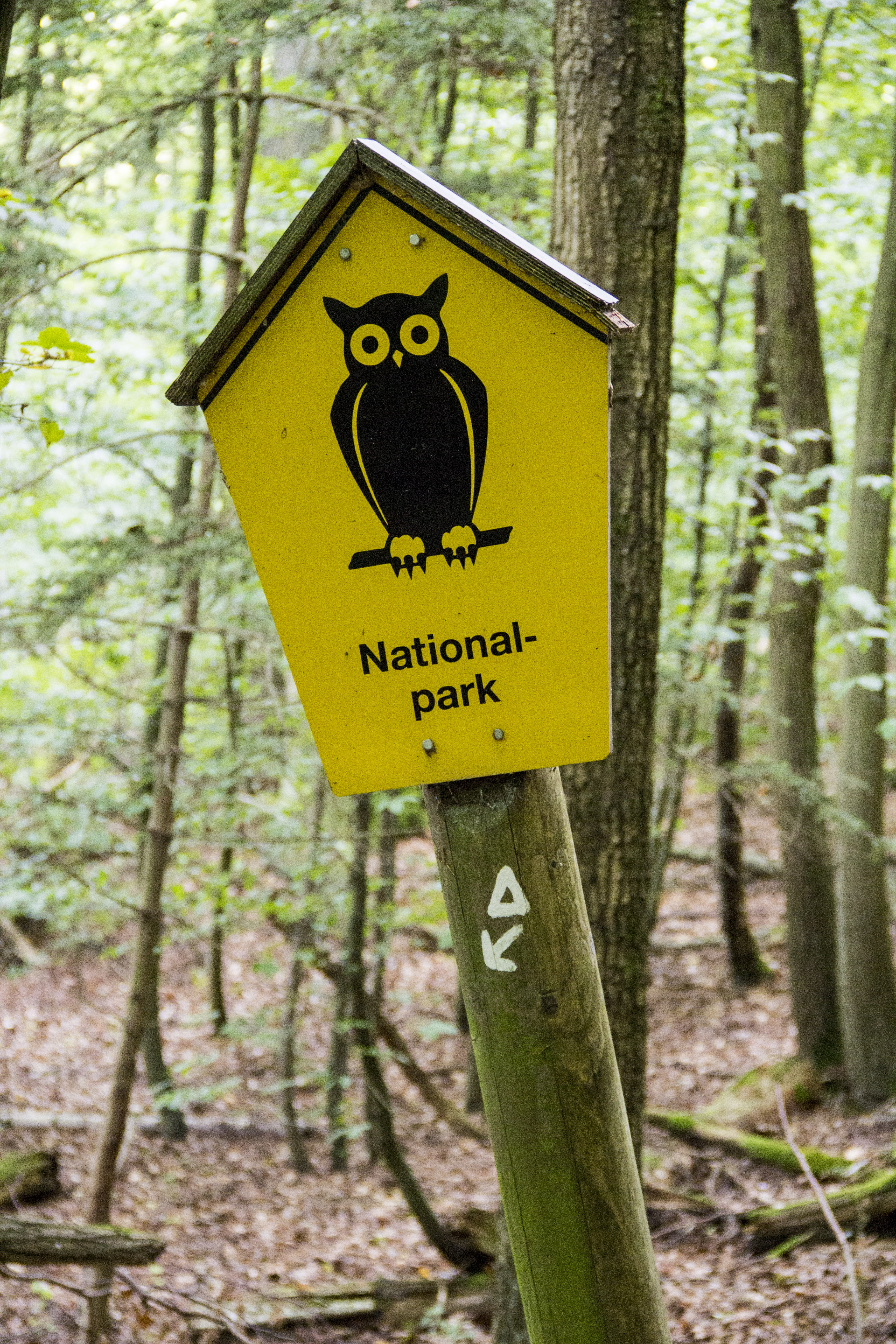 Nationalpark-Schild im Nationalpark Kellerwald-Edersee